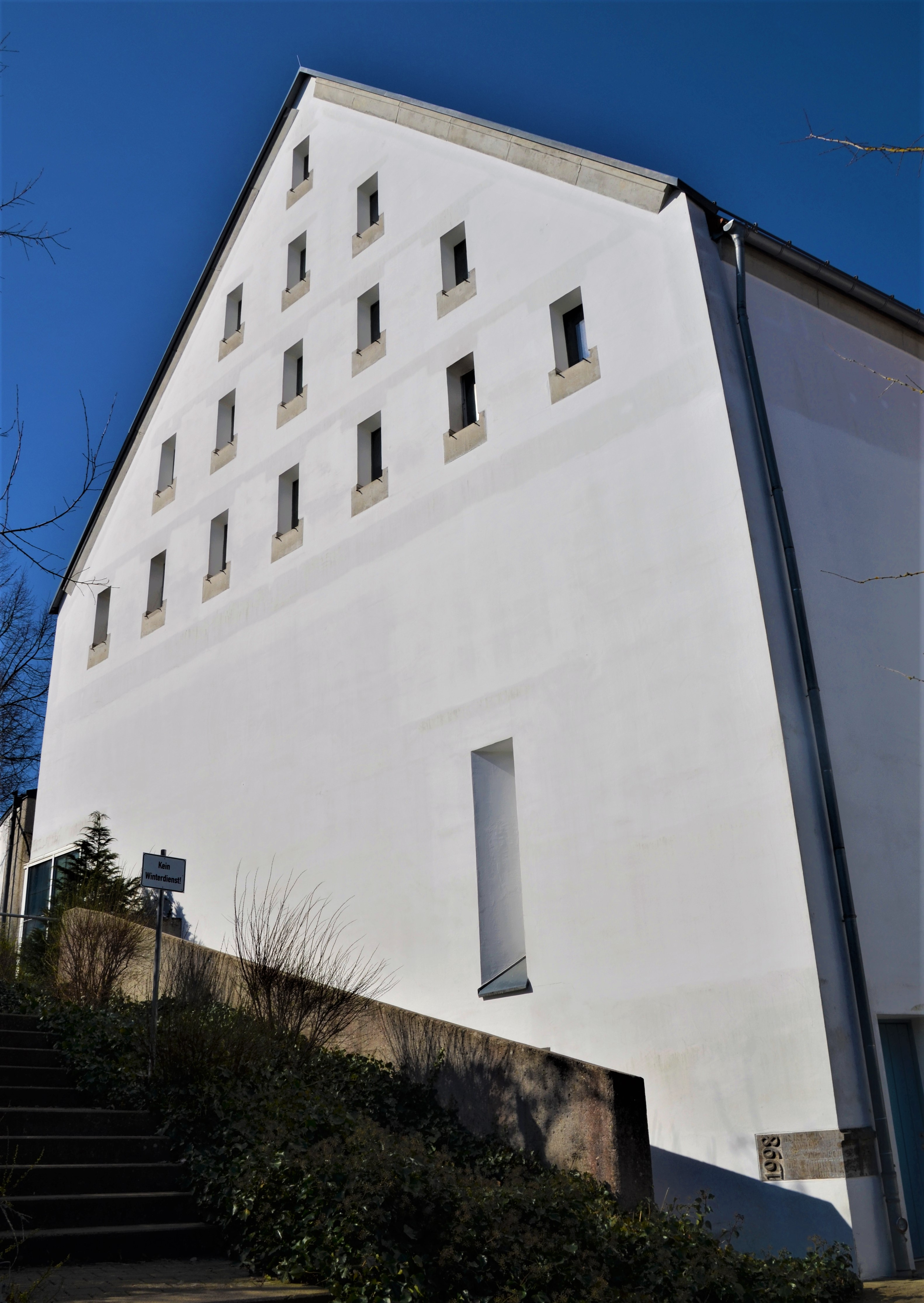 Neues Kloster der Franziskannerinenn der eweigen Anbetung, Klosterkirche von Osten